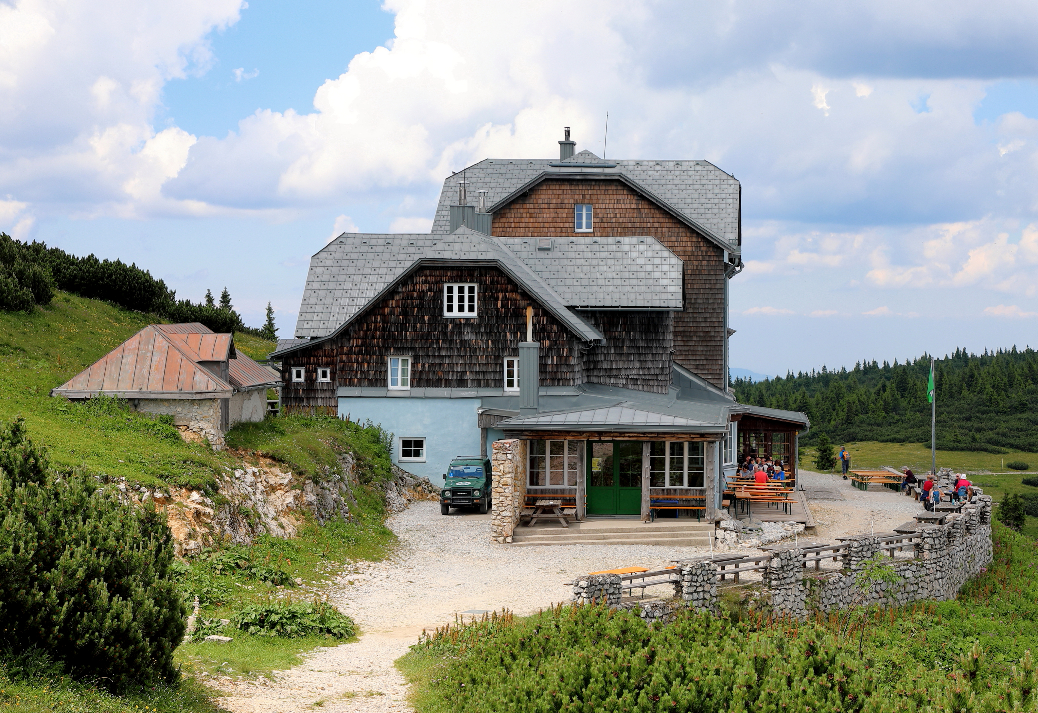 Südansicht des Otto-Schutzhauses auf der Rax in der niederösterreichischen Marktgemeinde Reichenau an der Rax.Das Schutzhaus wurde von der Sektion Reichenau des Deutschen und Österreichischen Alpenvereins errichtet und 1893 eröffnet. Unter Camillo Kronich, der fast ein halbes Jahrhundert als Hüttenwirt das Schutzhaus betrieb, wurde 1908/1909 nordseitig ein zweistöckiger Trakt mit 22 Schlafzimmern angebaut.